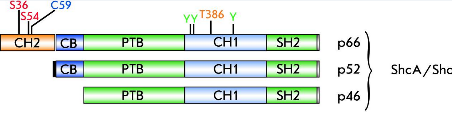 Доменная структура трёх Shc белков - р46, р52 и р66.